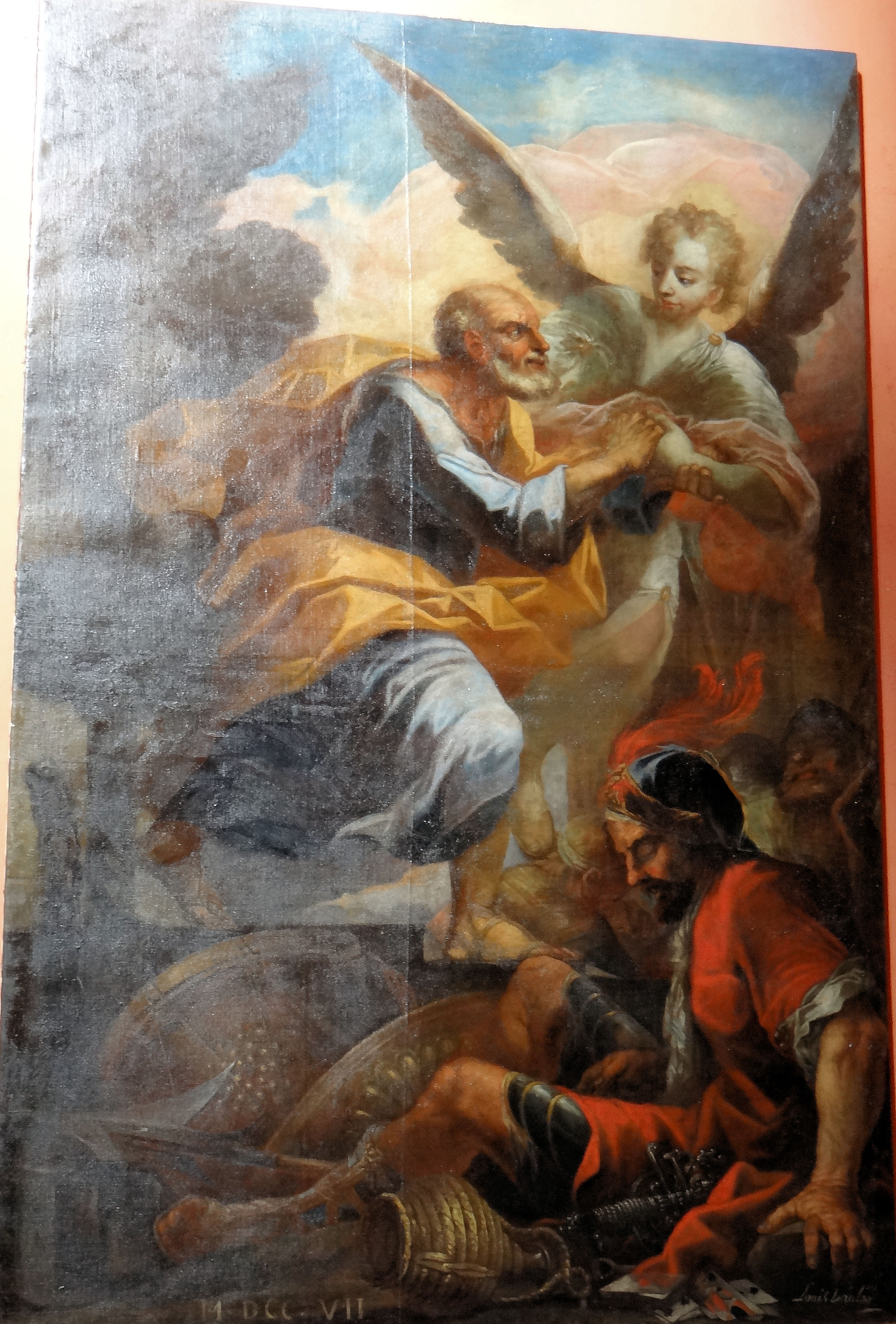 Louis-Abraham van Loo - Tableau : Saint Pierre délivré par un ange (1707), dans l'église de Gilette